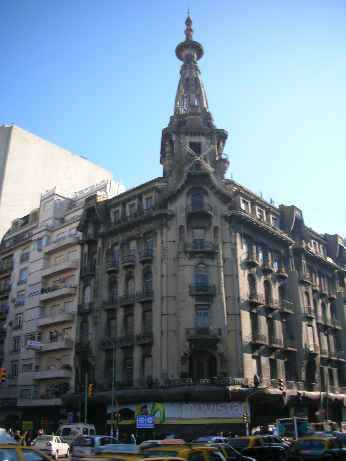 Vieja Cafetería El Molino, Rivadavia y Callao, Buenos Aires, Argentina